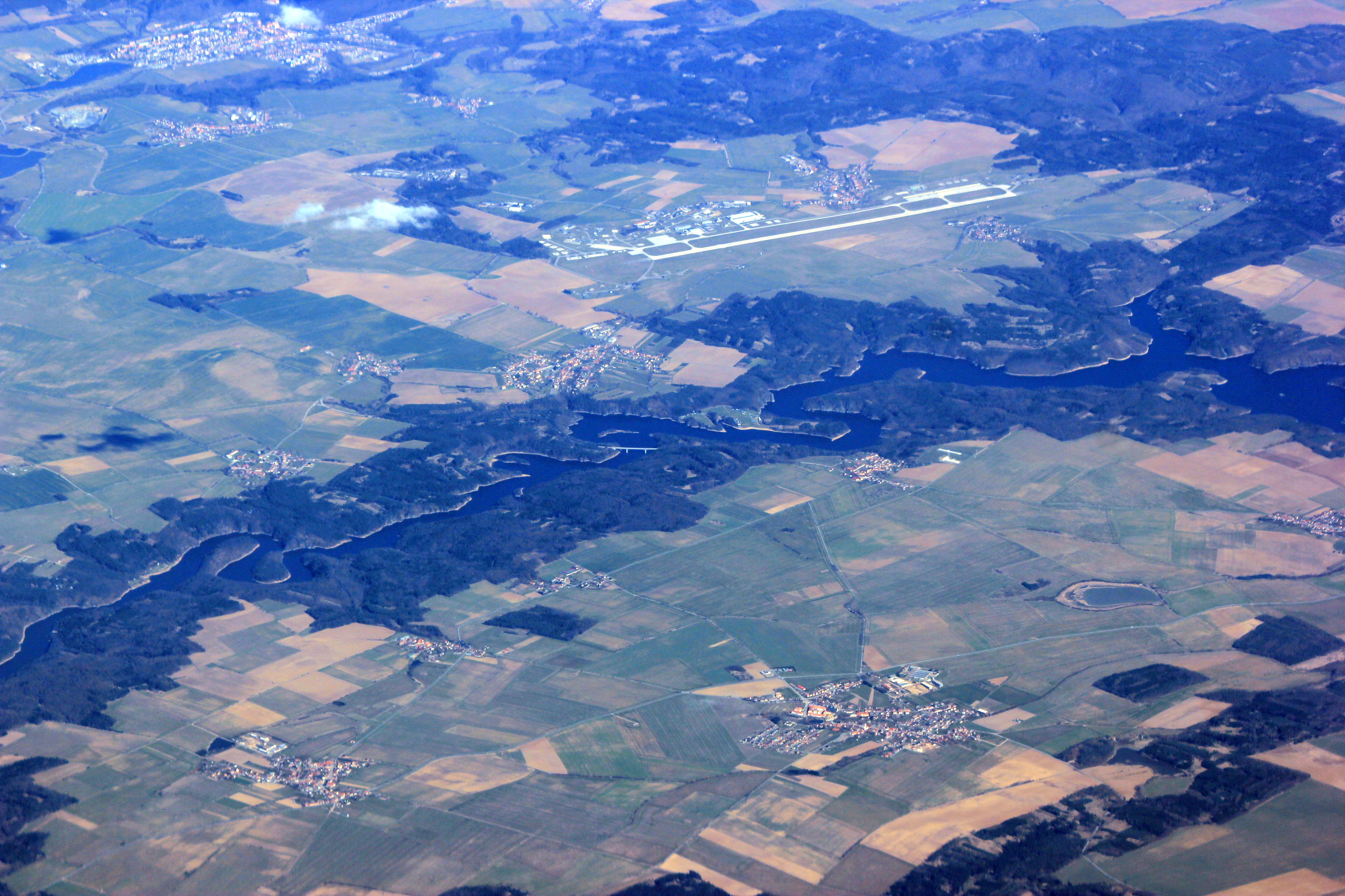 Luftbild der Talsperre Dalešice an der Jihlava in Südmähren.